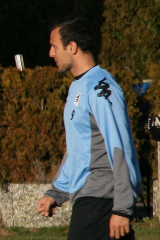 Antonio Di Salvo, player of TSV 1860 München, training, 20.01.2007, Grünwalder Str., Munich